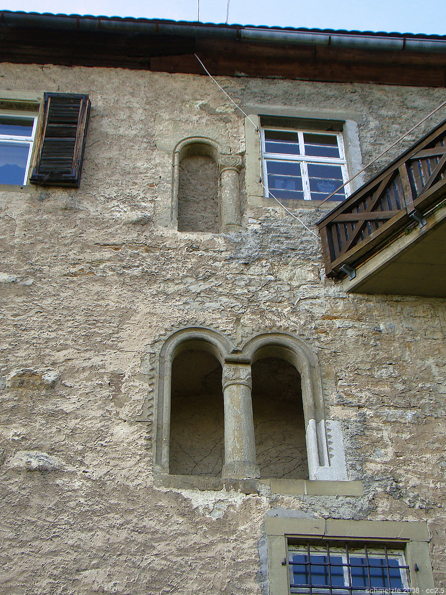 Romanische Doppelfenster der Burg Hornberg